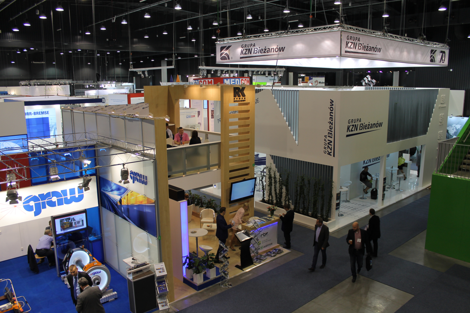 Stoiska w hali B AmberExpo podczas targów Trako 2015. The making of this document was supported by Wikimedia Polska Association, within Wikigrant no. WG 2015-34. English | polski | +/−